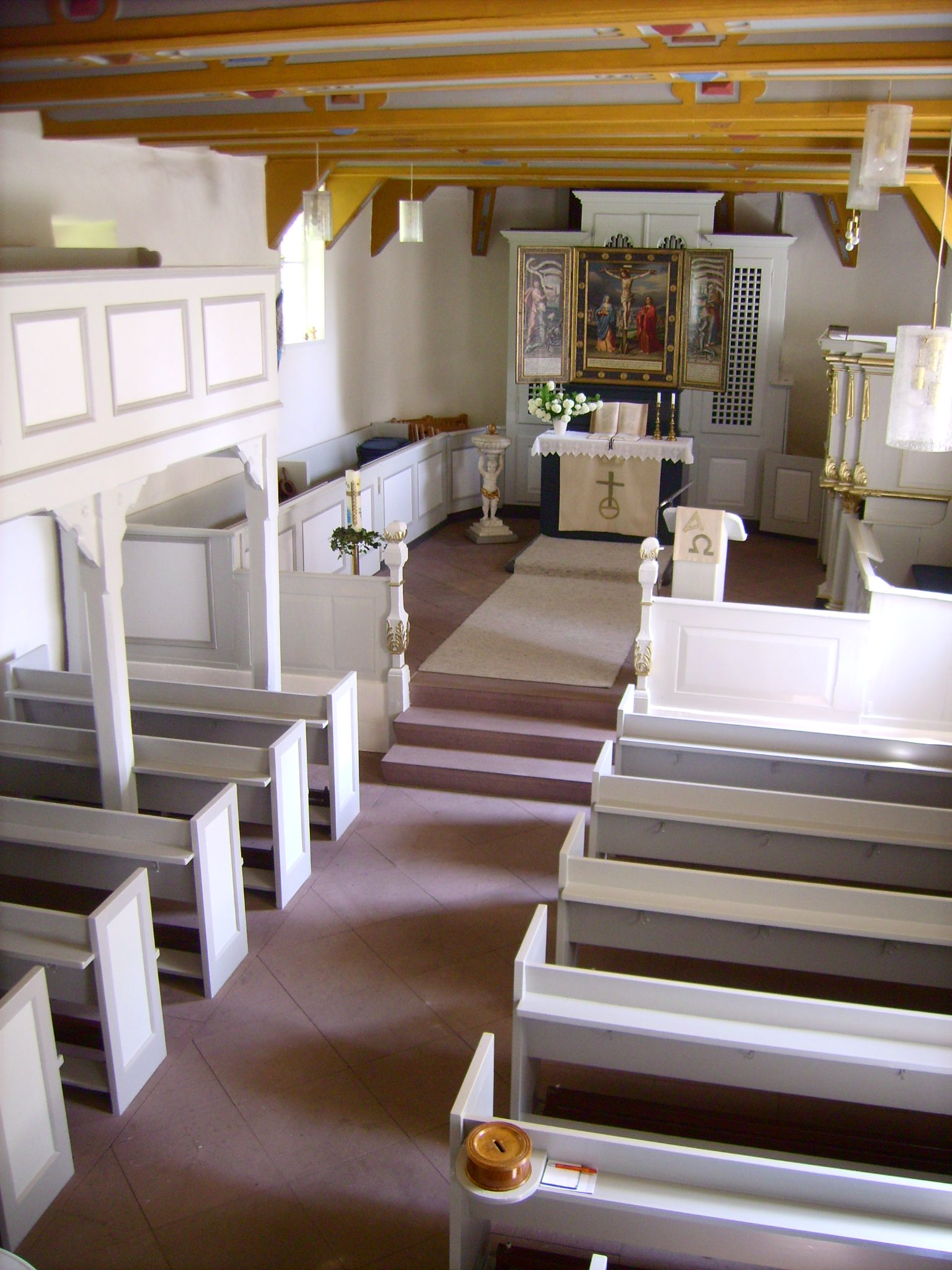 St.-Urban-Kirche Klein Ilsede, Innenansicht 2009